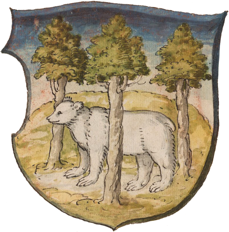 Герб Холмской земли Речи Посполитой